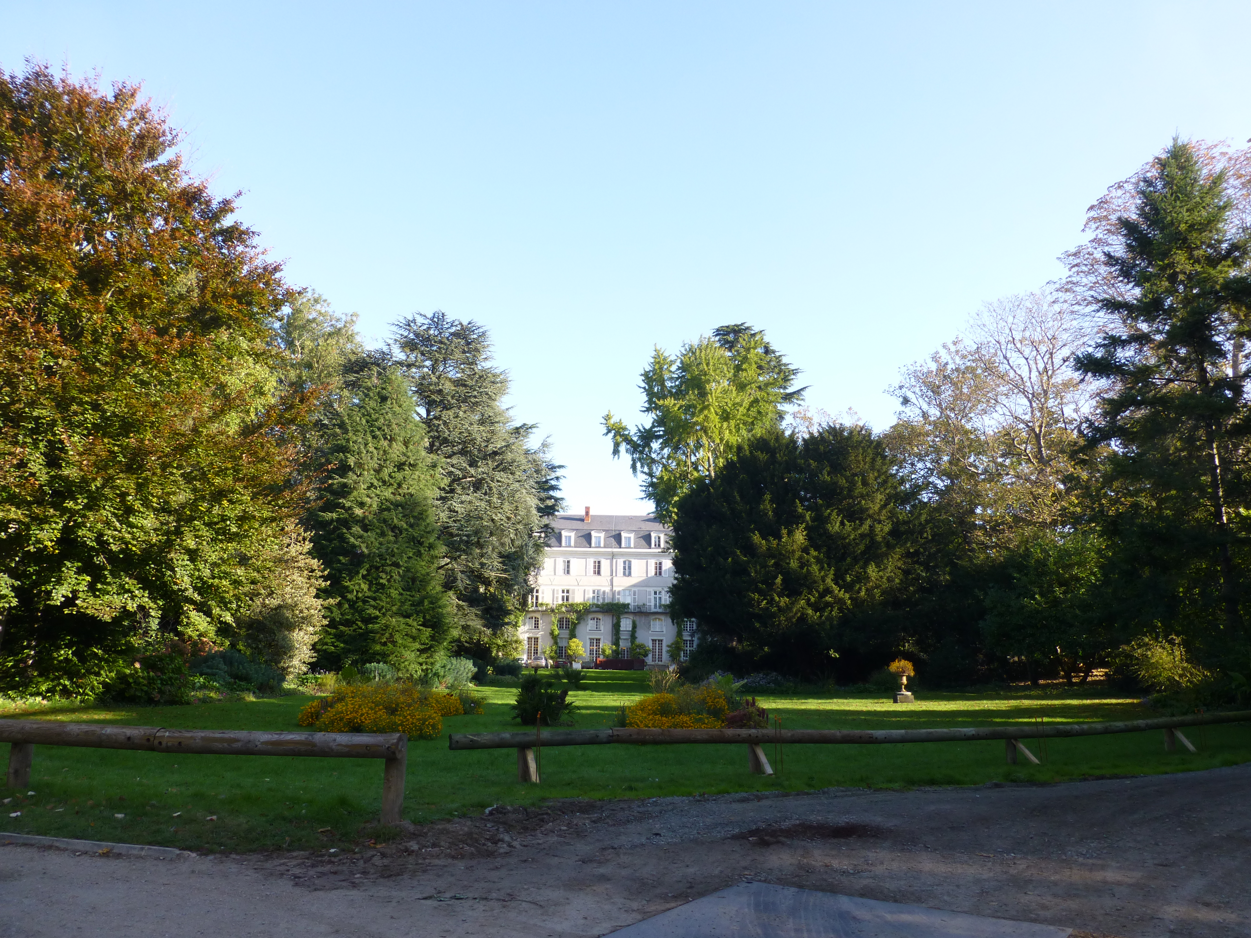 Angers, Jardin de l'hôtel de la préfecture.